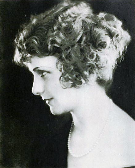 Edna Murphy